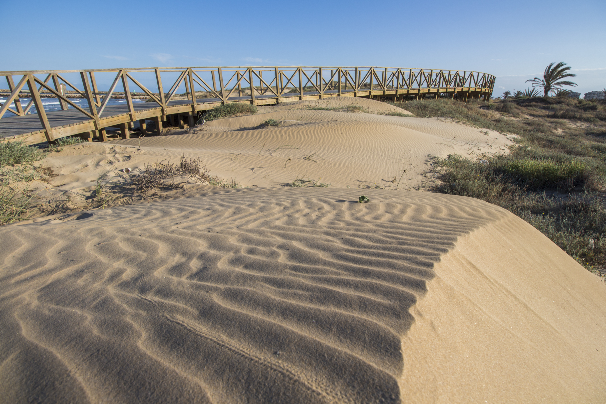 Dunas de Guardamar This is a photography of a Site of Community Importance in Spain with the ID: ES5213025. Natura2000 entry, EEA entry